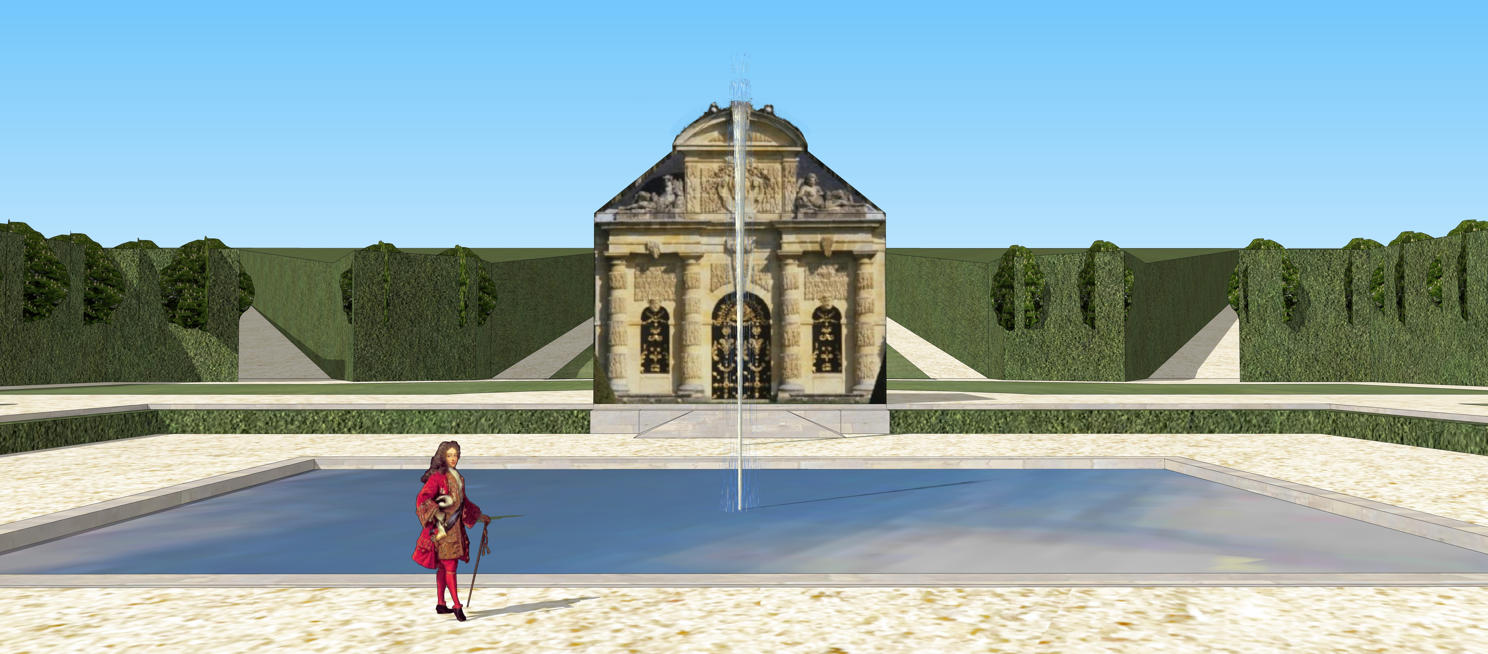 Vue restituée en se plaçant devant le Nymphée de Wideville.